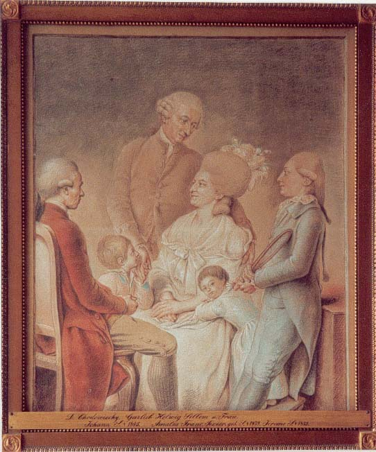 Familieportret gemaakt door Daniel Chodowiecki. In het Sillem familieportret plaatste hij zichzelf (uiterst links), tekenend. Afgebeeld zijn: Garlieb Helwig en Louise Maria met hun kinderen Jean (links), Franciska en Jérome Sillem met badminton racket.